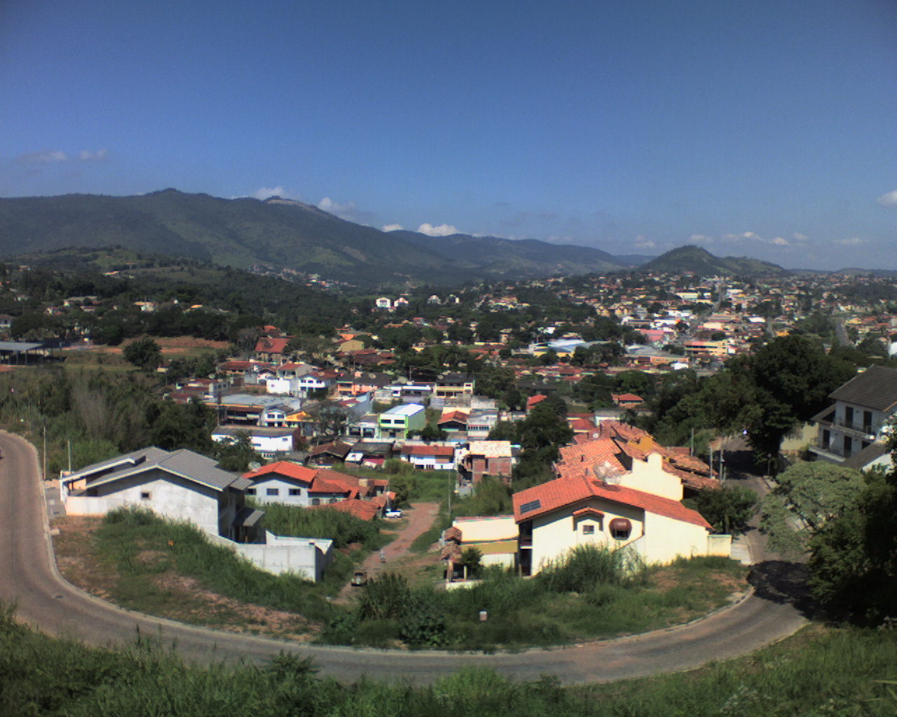 Atibaia vista do centro da cidade